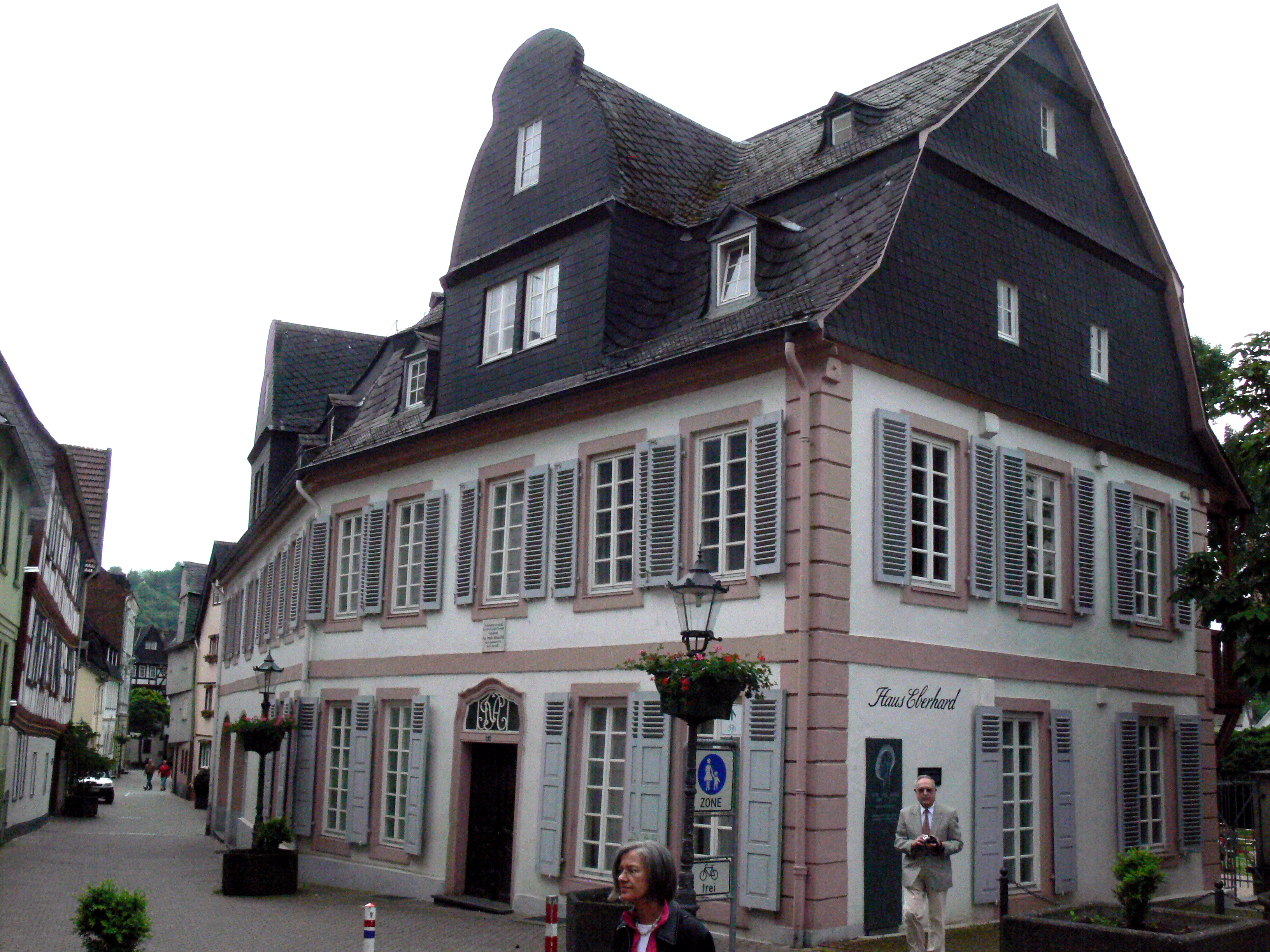 Haus Eberhard in Diez. In diesem Haus wohnte der Pomologe Geheimrat August Friedrich Adrian Diel (*Gladenbach 1756 + Diez 1839)